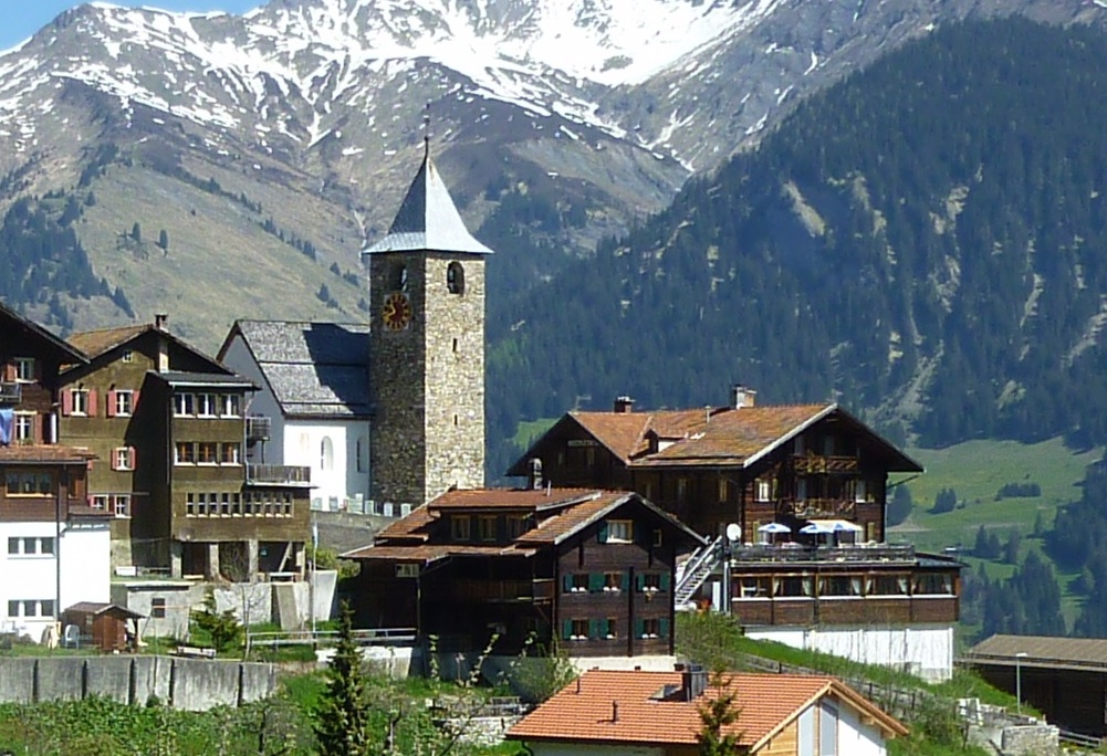 Tschierten, Ansicht von Süden